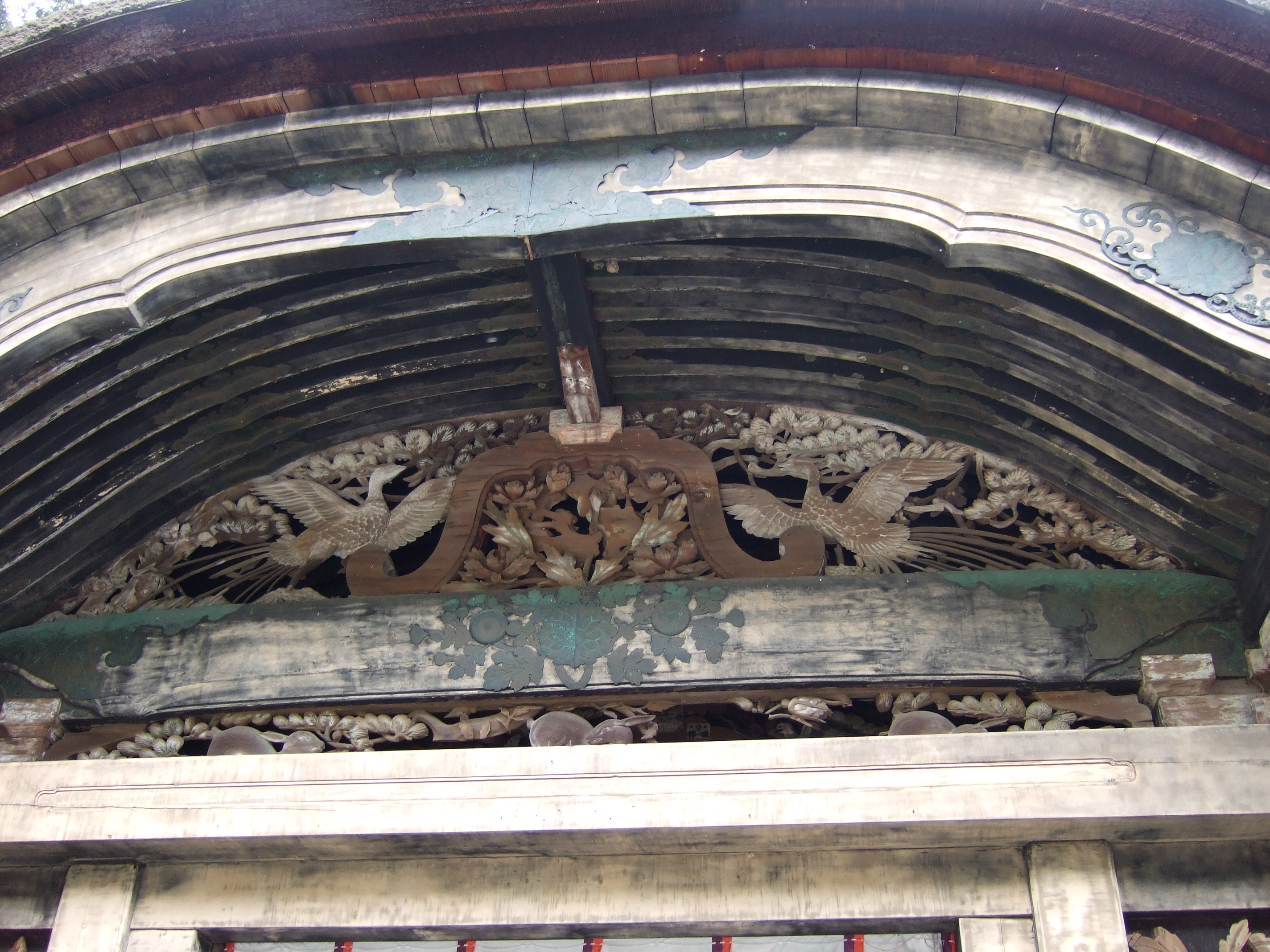 宝厳寺